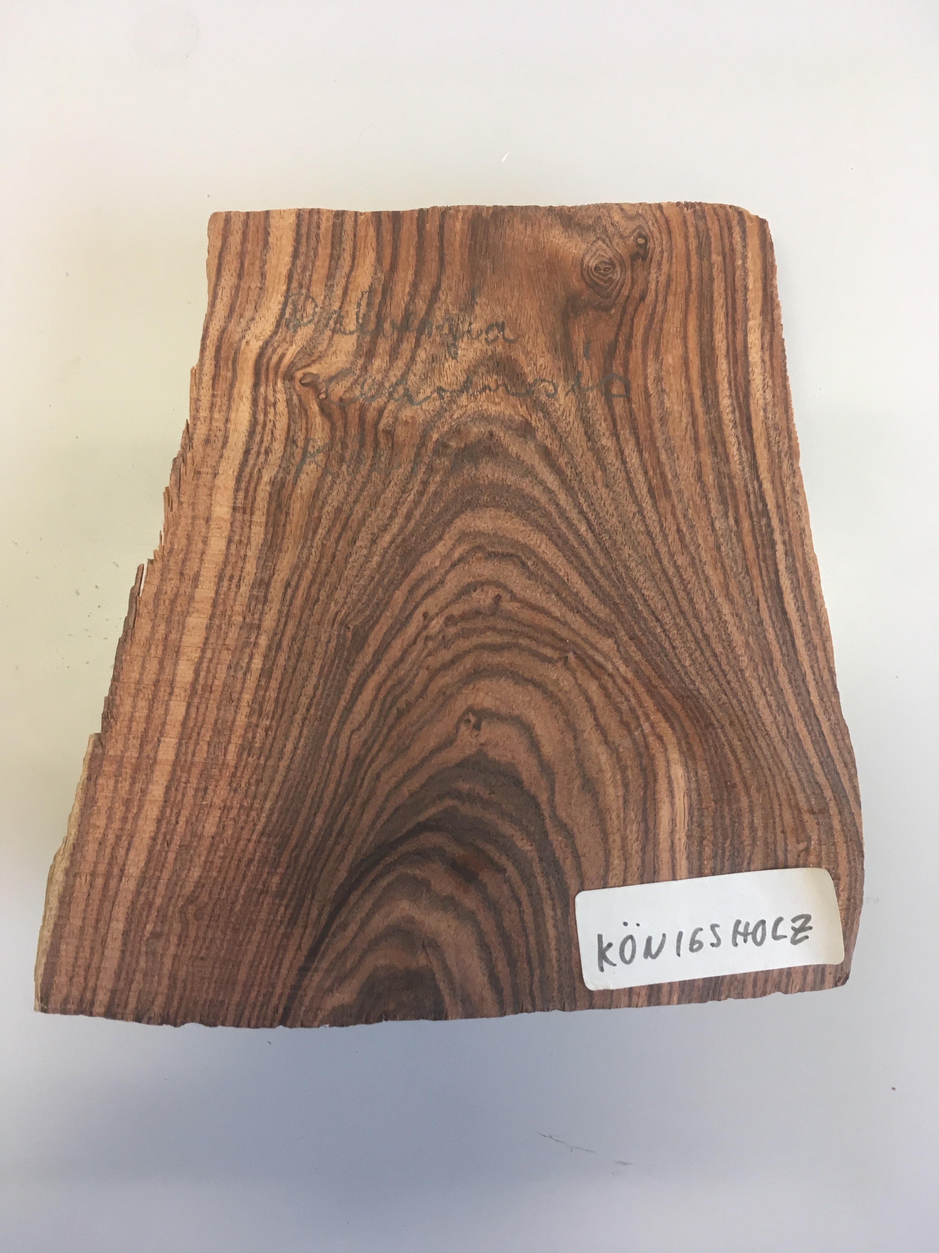 Dalbergia cearensis, Radialschnitt